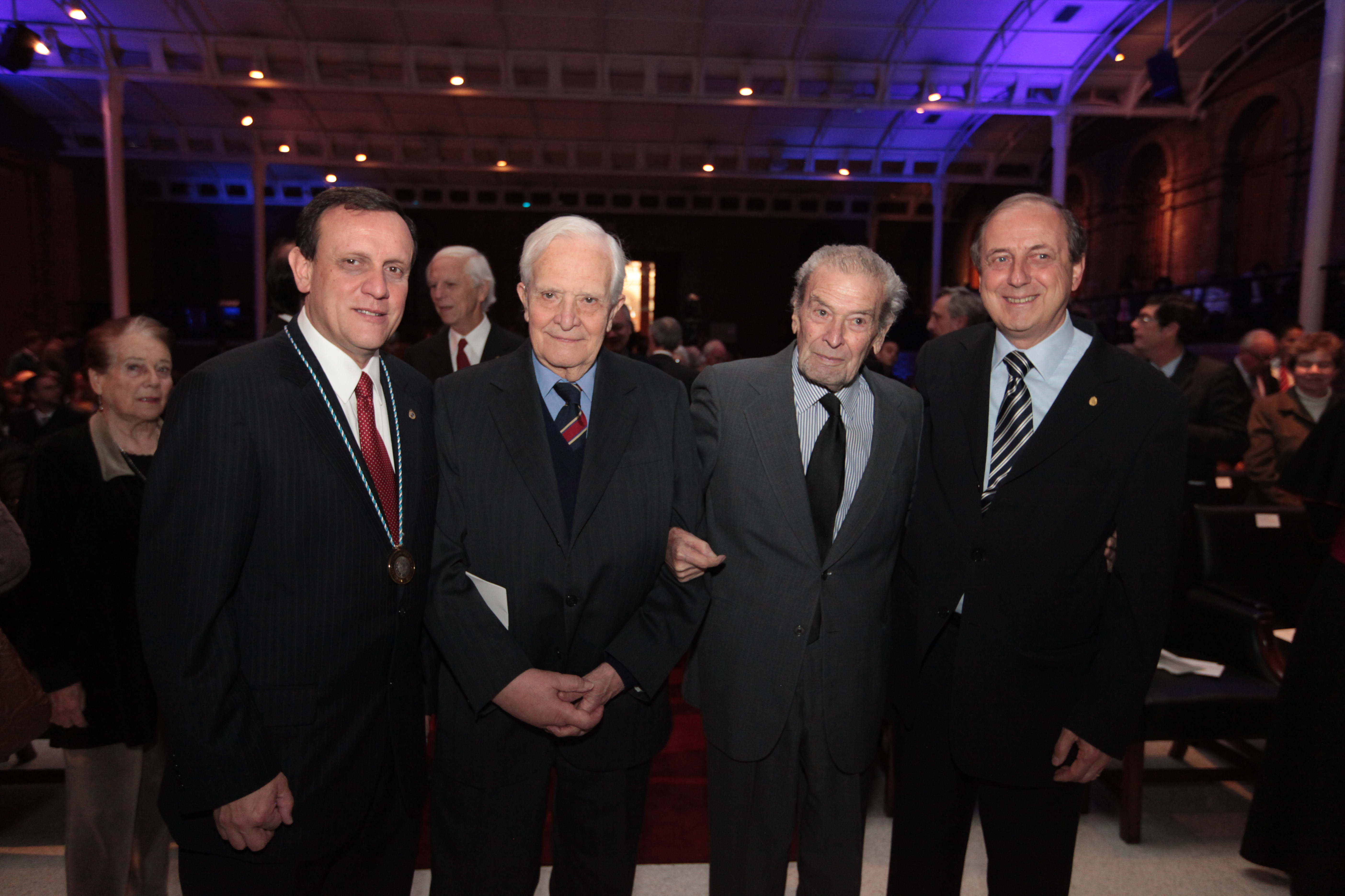 Rectores de la Pontificia Universidad Católica de Chile: Ignacio Sánchez, Juan de Dios Vial, Fernando Castillo Velasco y Pedro Pablo Rosso.